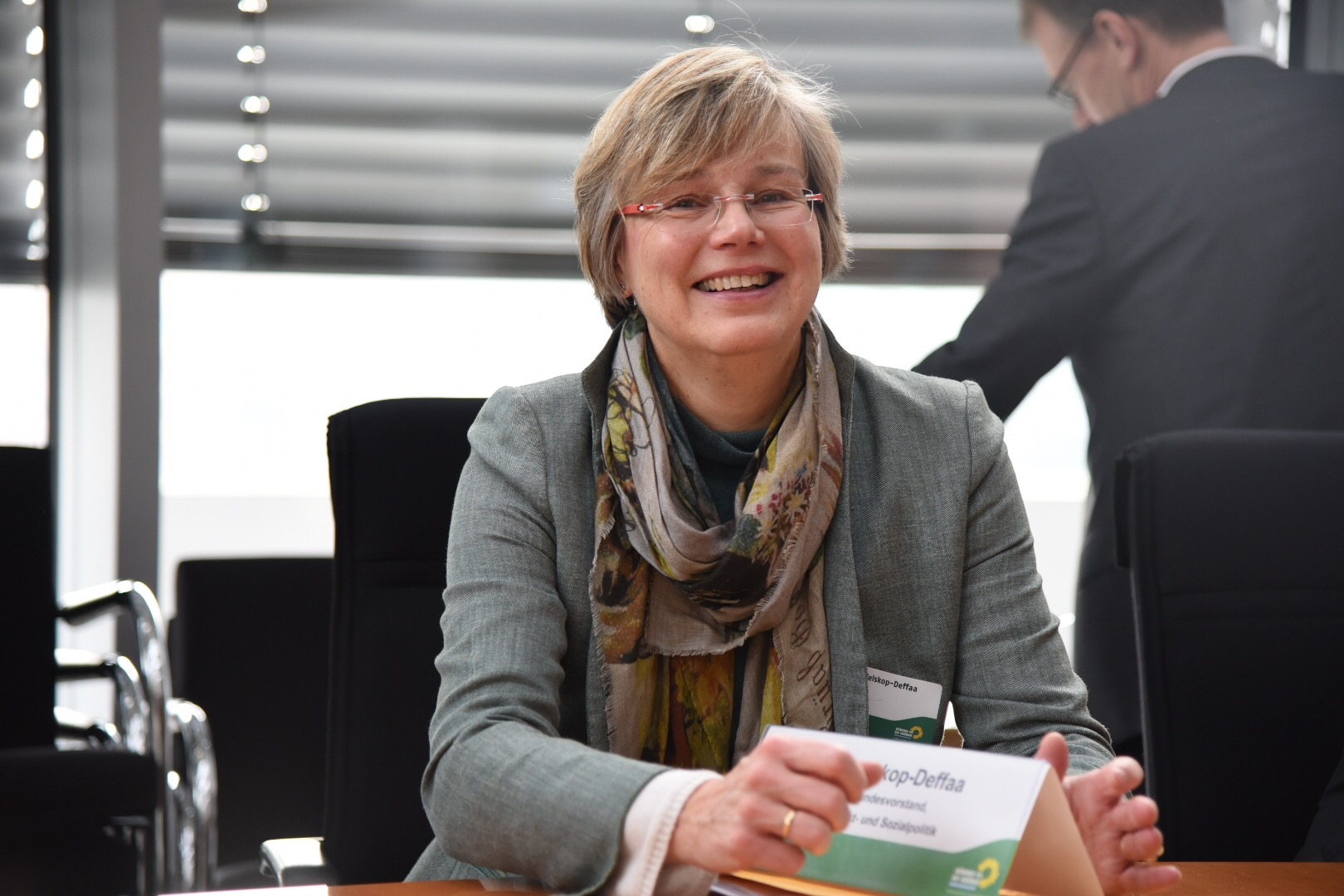 Eva Maria Welskop-Deffaa bei der Rententagung im Oktober 2016 der Fraktion Bündnis 90/die Grünen